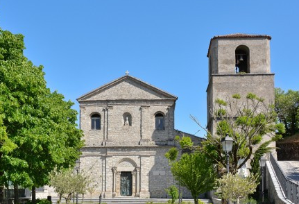 vista della facciata della chiesa di san gianuario in marsico nuovo